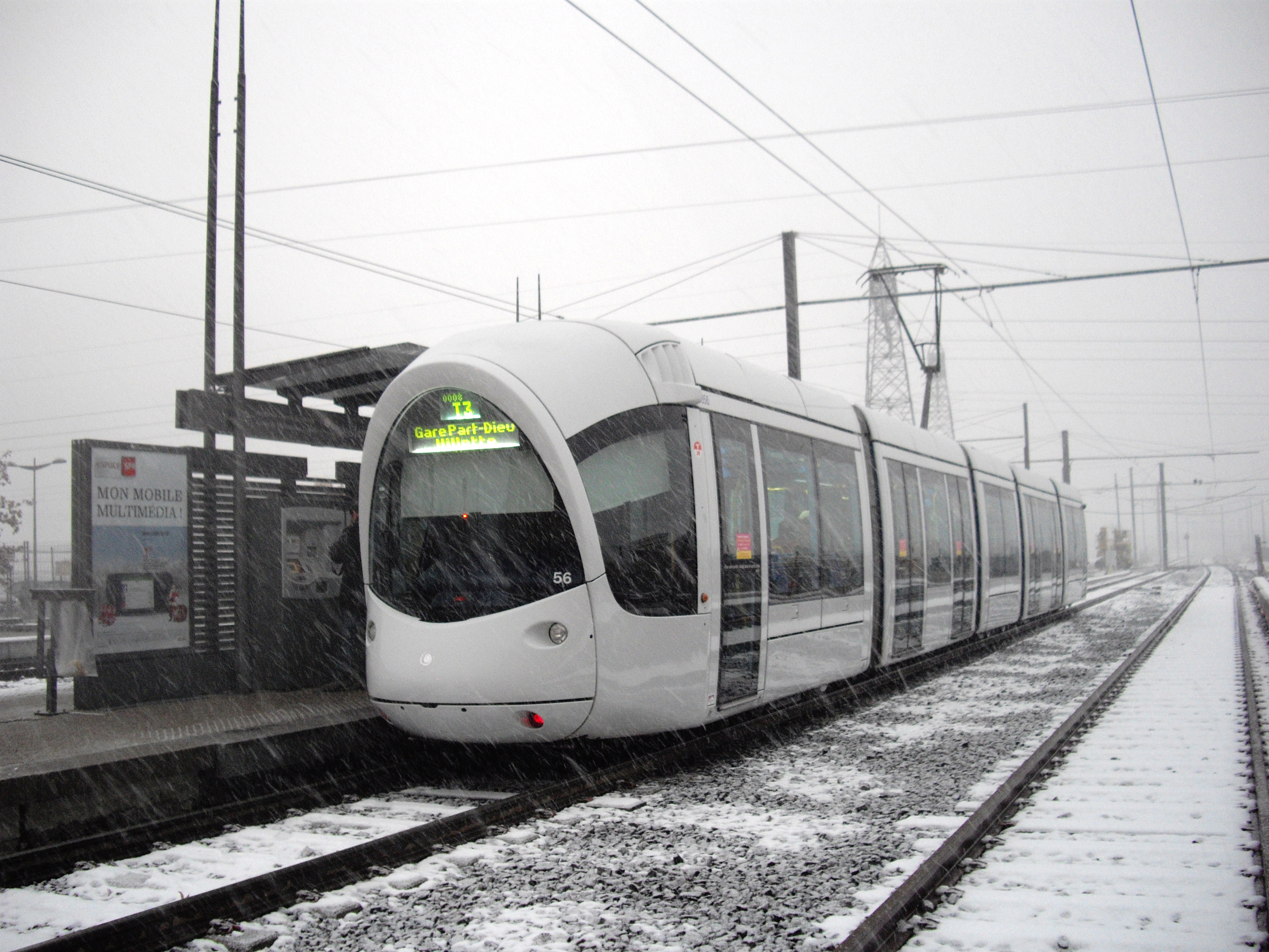 Alstom Citadis 302 - Tramway de Lyon Ligne T3 - Station Meyzieu Z.I.